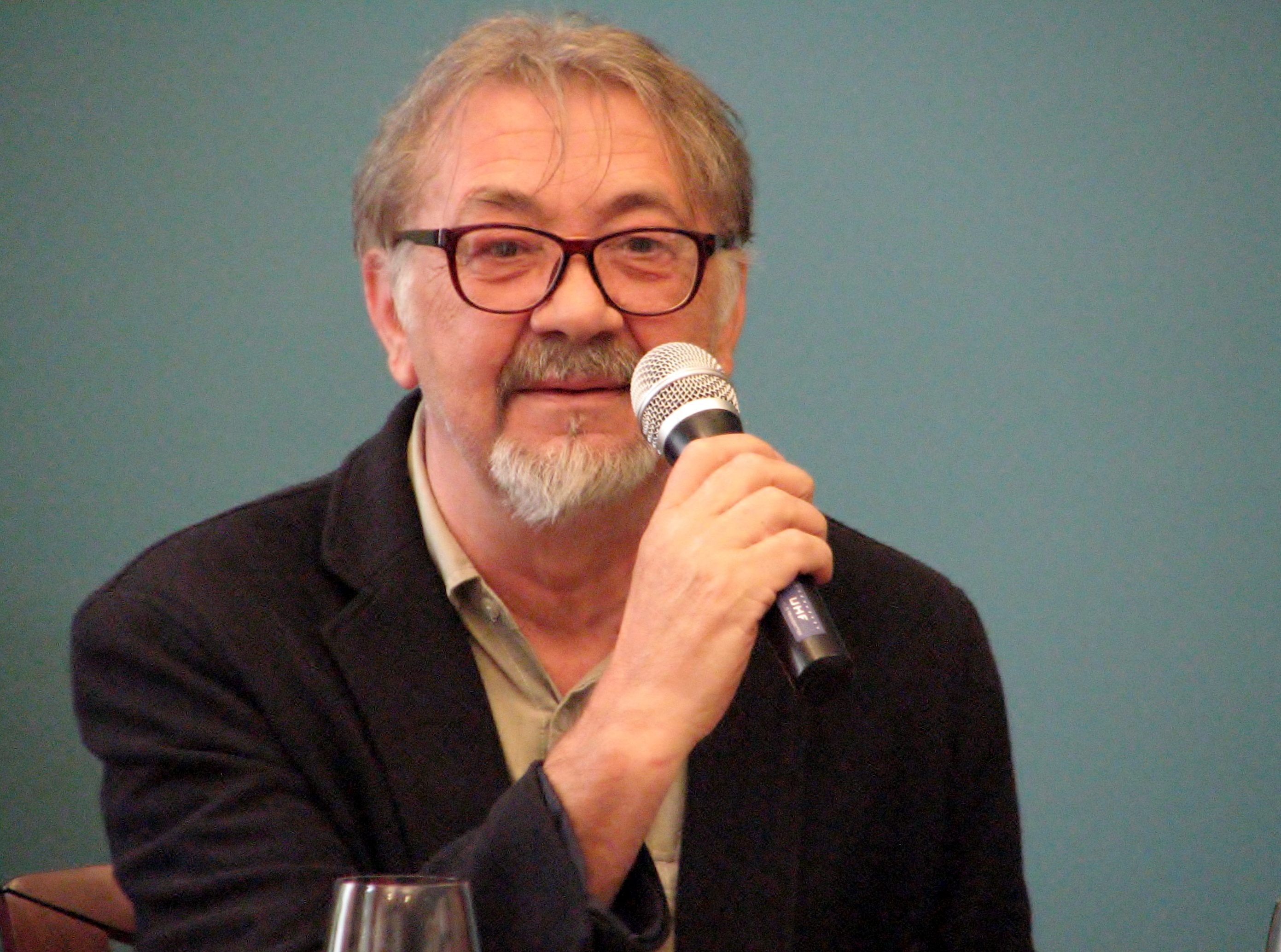 Goran Simić esinemas kirjandusfestivali HeadRead raames Tallinna Keskraamatukogus